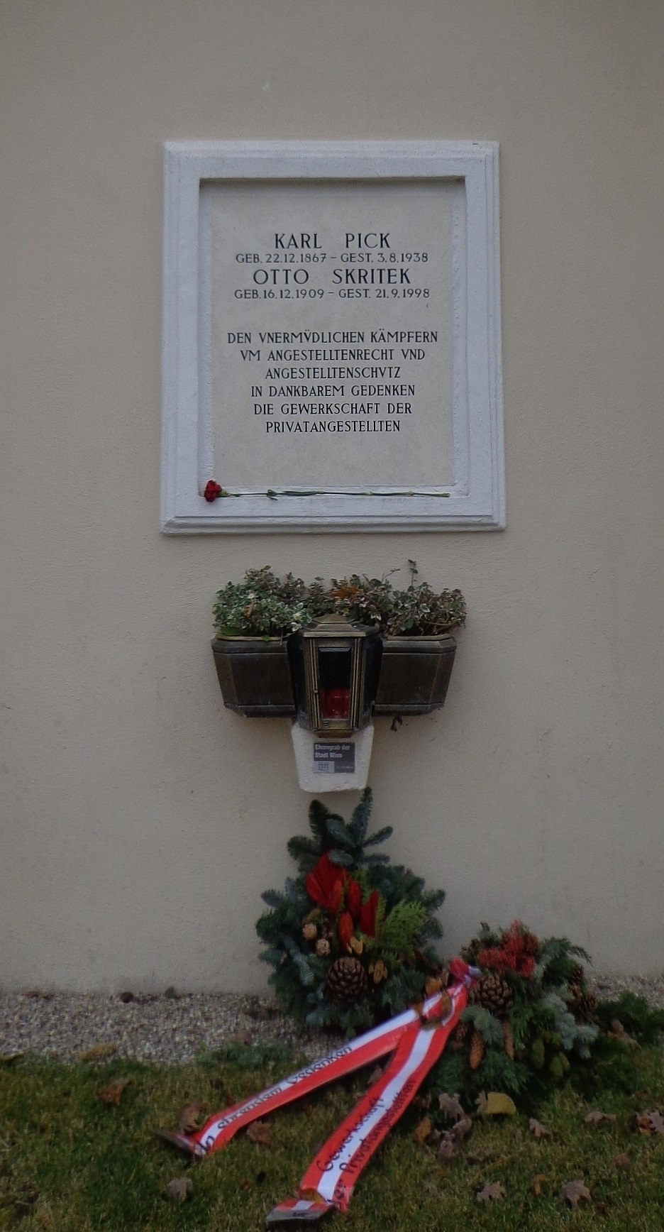 Feuerhalle Simmering - Abteilung ML (Umfassungsmauer): Urnengrab von Karl Pick und Otto Skritek